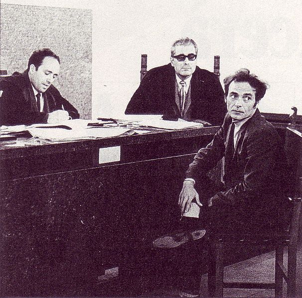 Pietro Valpreda, né le 29 août 1933 à Milan et mort en 6 juillet 2002 dans la même ville, est un anarchiste, danseur et écrivain italien. Dans le cadre de la stratégie de la tension, il est accusé à tort d'être le responsable de l'attentat de piazza Fontana.